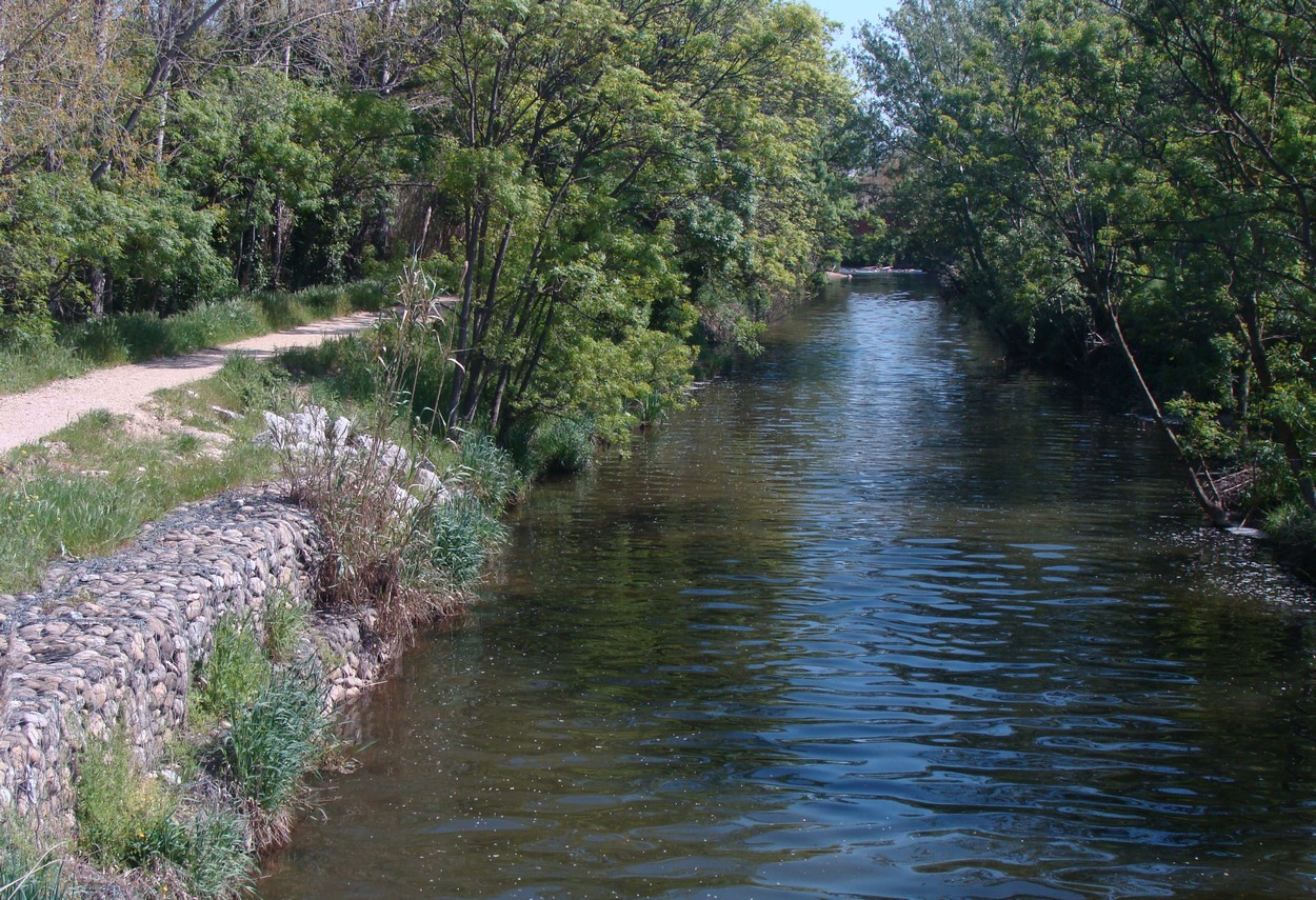 Le ruisseau de la Cadière canalisé, près de son embouchure, à Marignane.